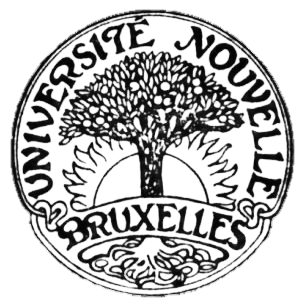 Il s'agit du sceau que l'Université Nouvelle utilisera tout au long de son existence. Il sera aposé sur divers documents : papiers à lettre, diplômes, publications, etc.